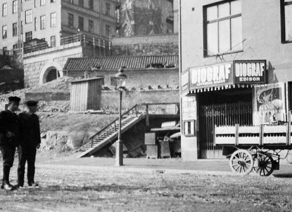 framför Biograf Edison på Regeringsgatan 111.